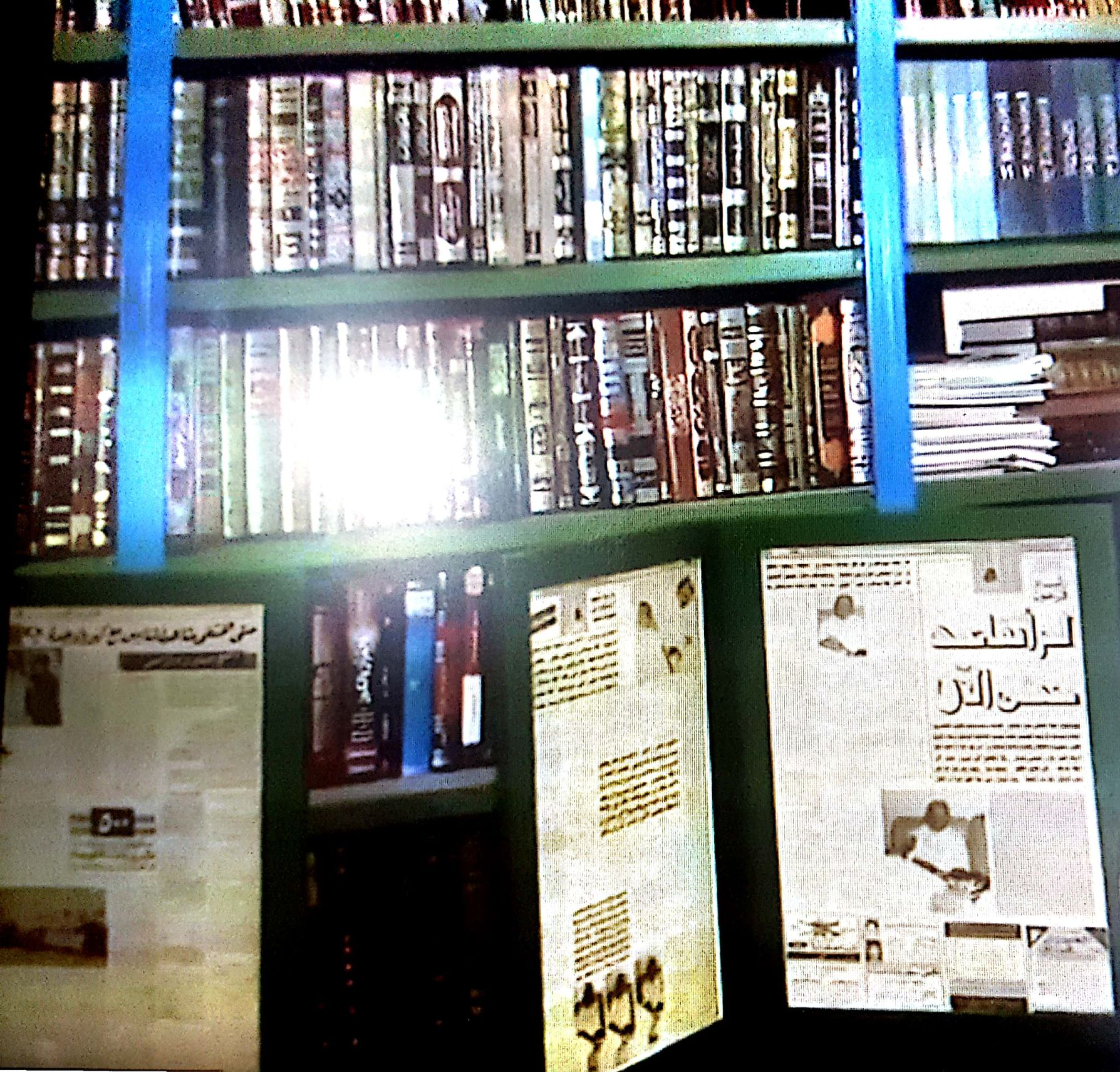 صور